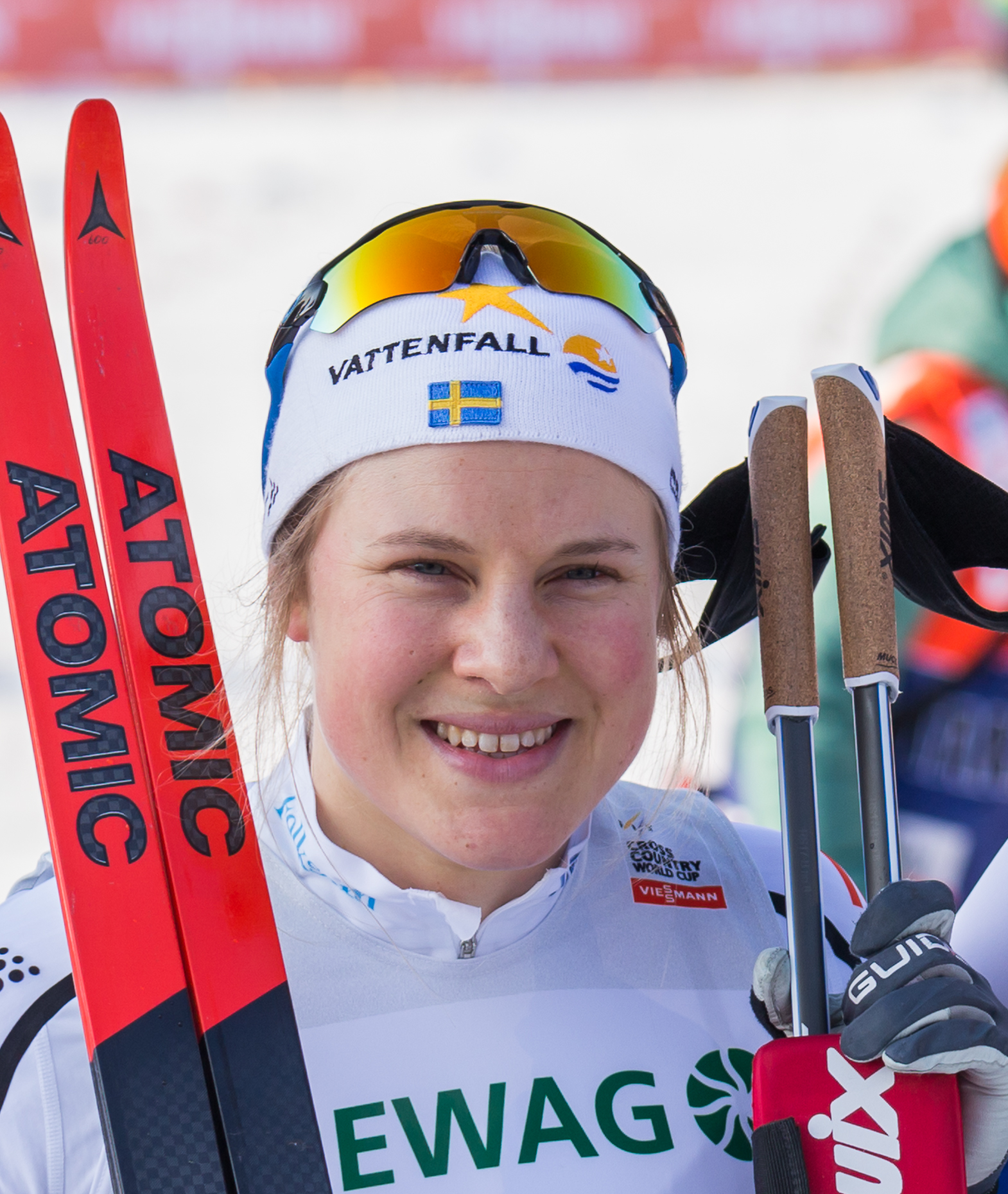 Hanna Falk (SWE, Schweden)